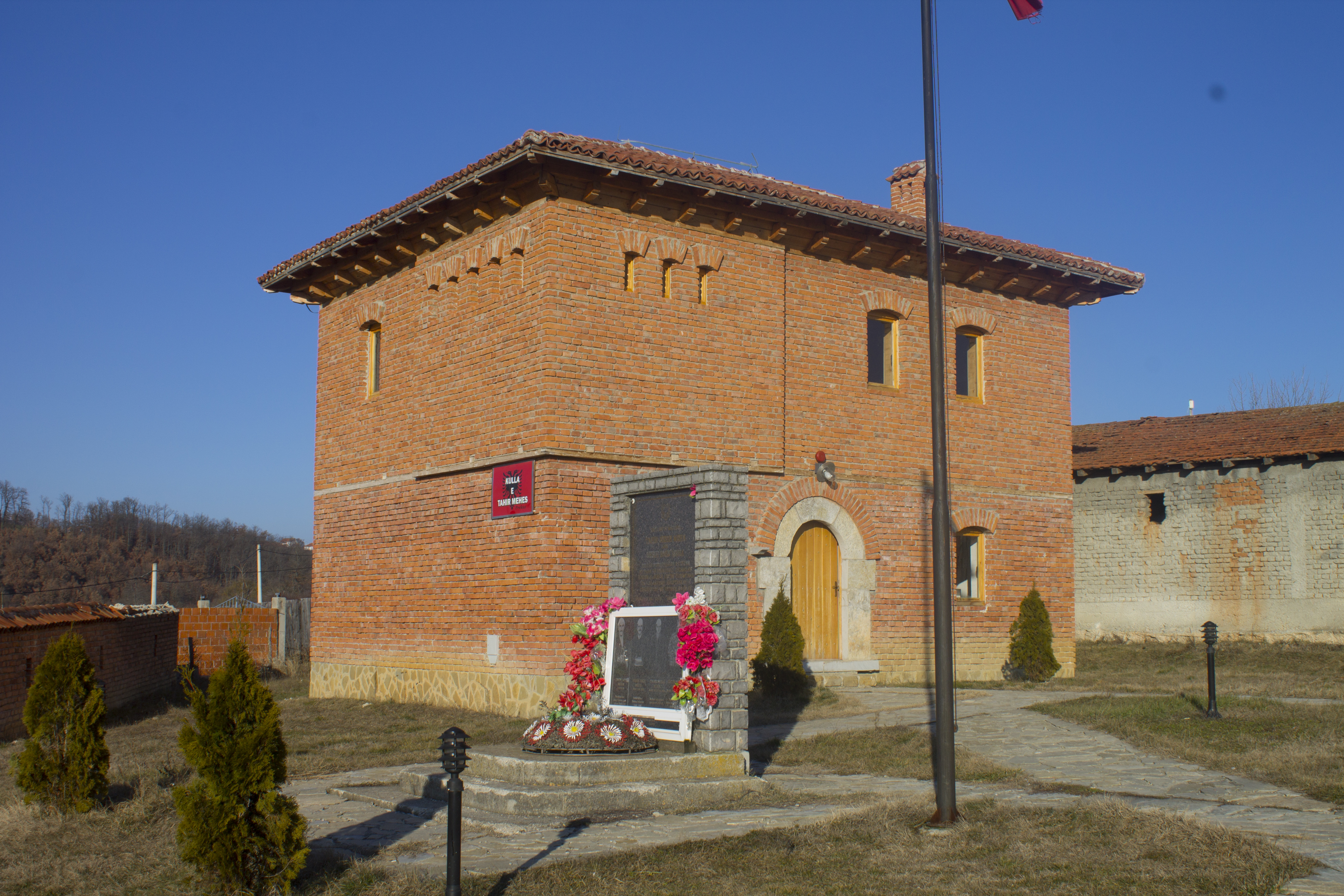 Kulla e Tahir Mehes ne Prekaz